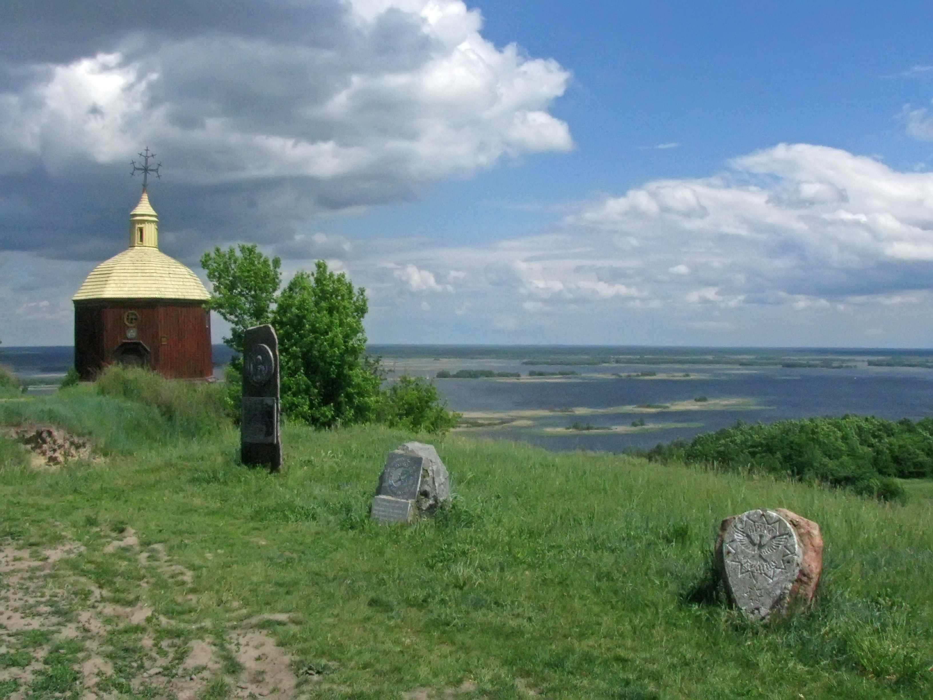 Городище літописного міста Святополча в селі Витачів